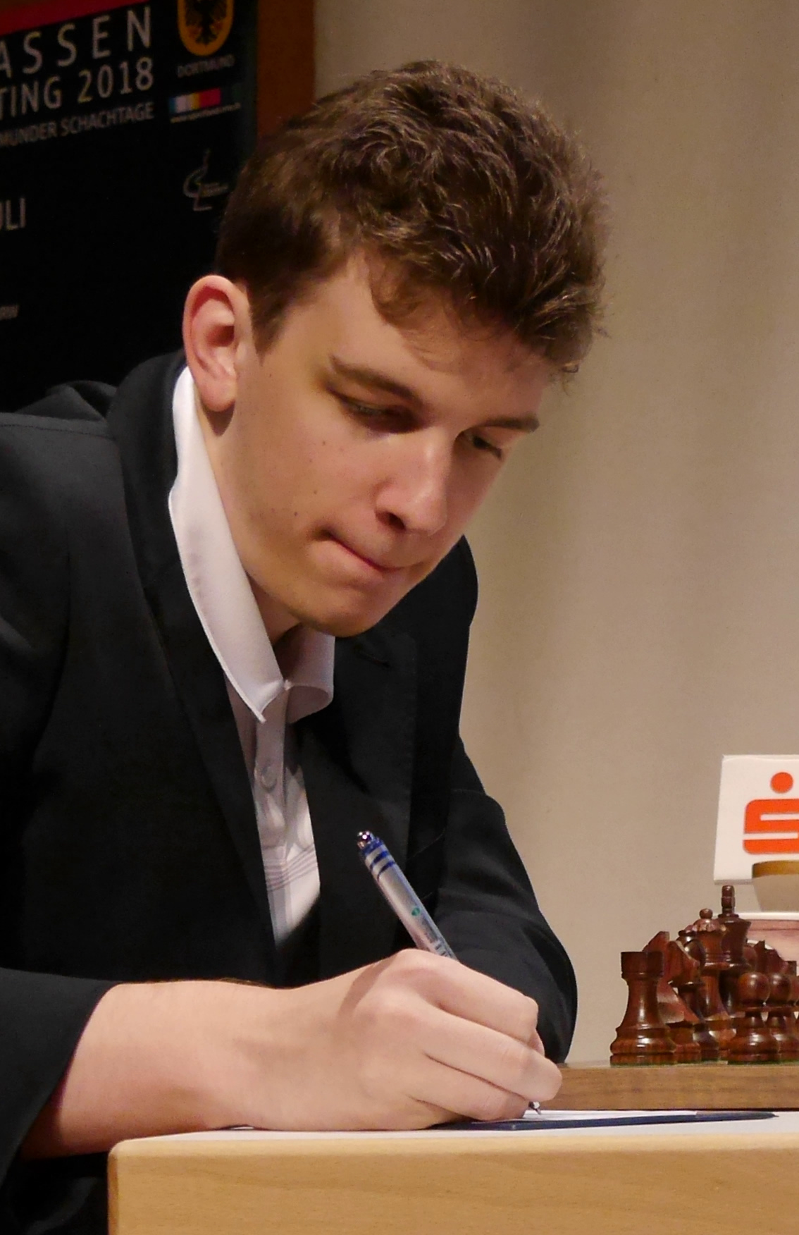 Jan-Krzysztof Duda, Dortmunder Schachtage 2018.